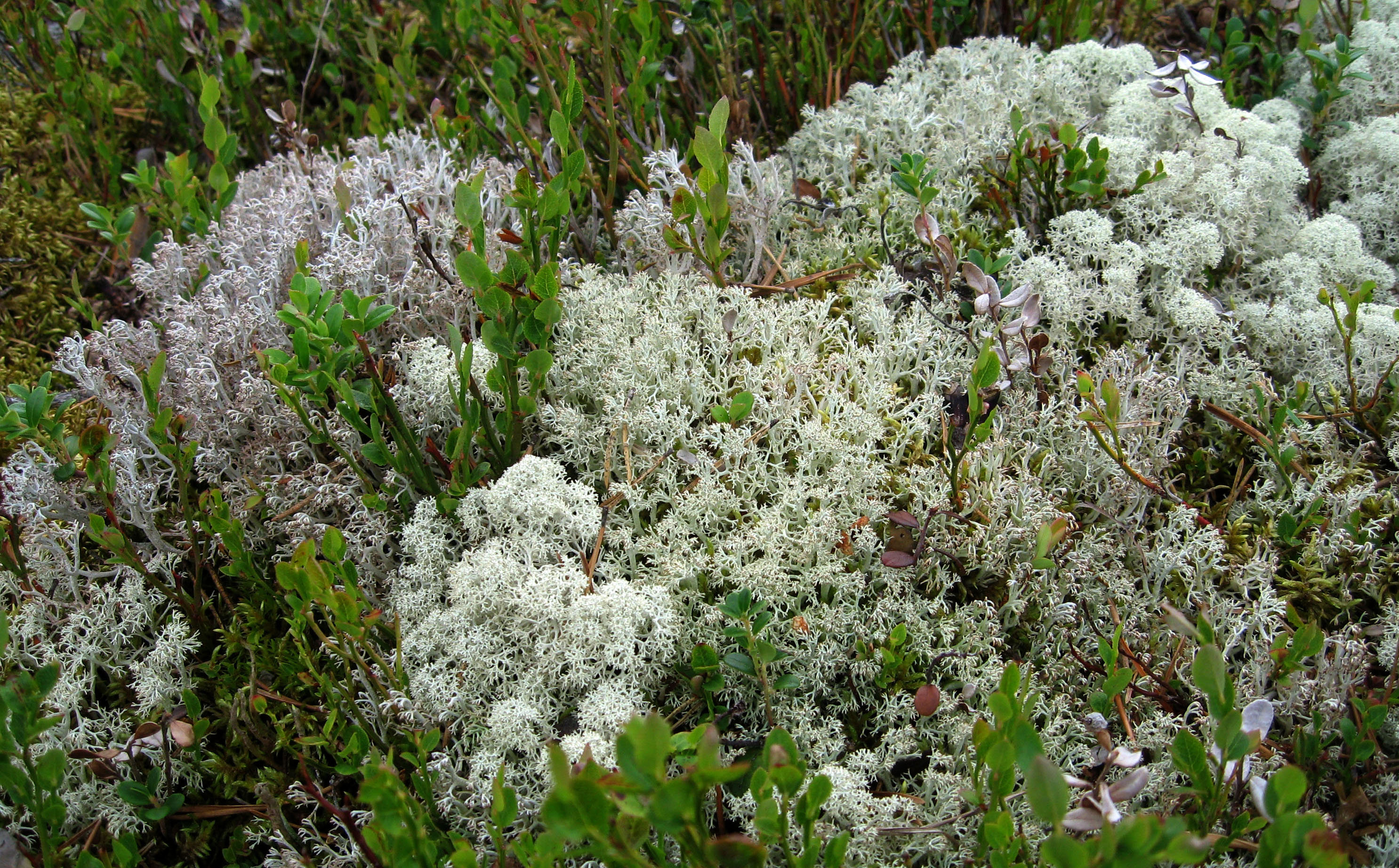 Grå reinlav (Cladonia rangiferina), Kvitkrull (Cladonia stellaris) og Lys reinlav (Cladonia arbuscula)